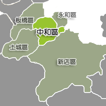 中文（台灣）: 中和區相對位置。